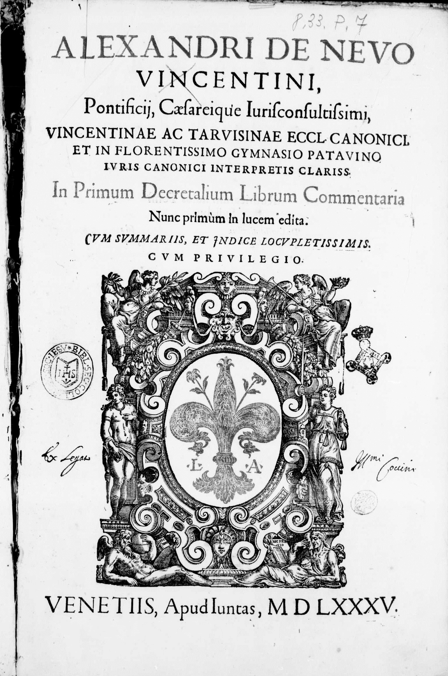 Frontespizio